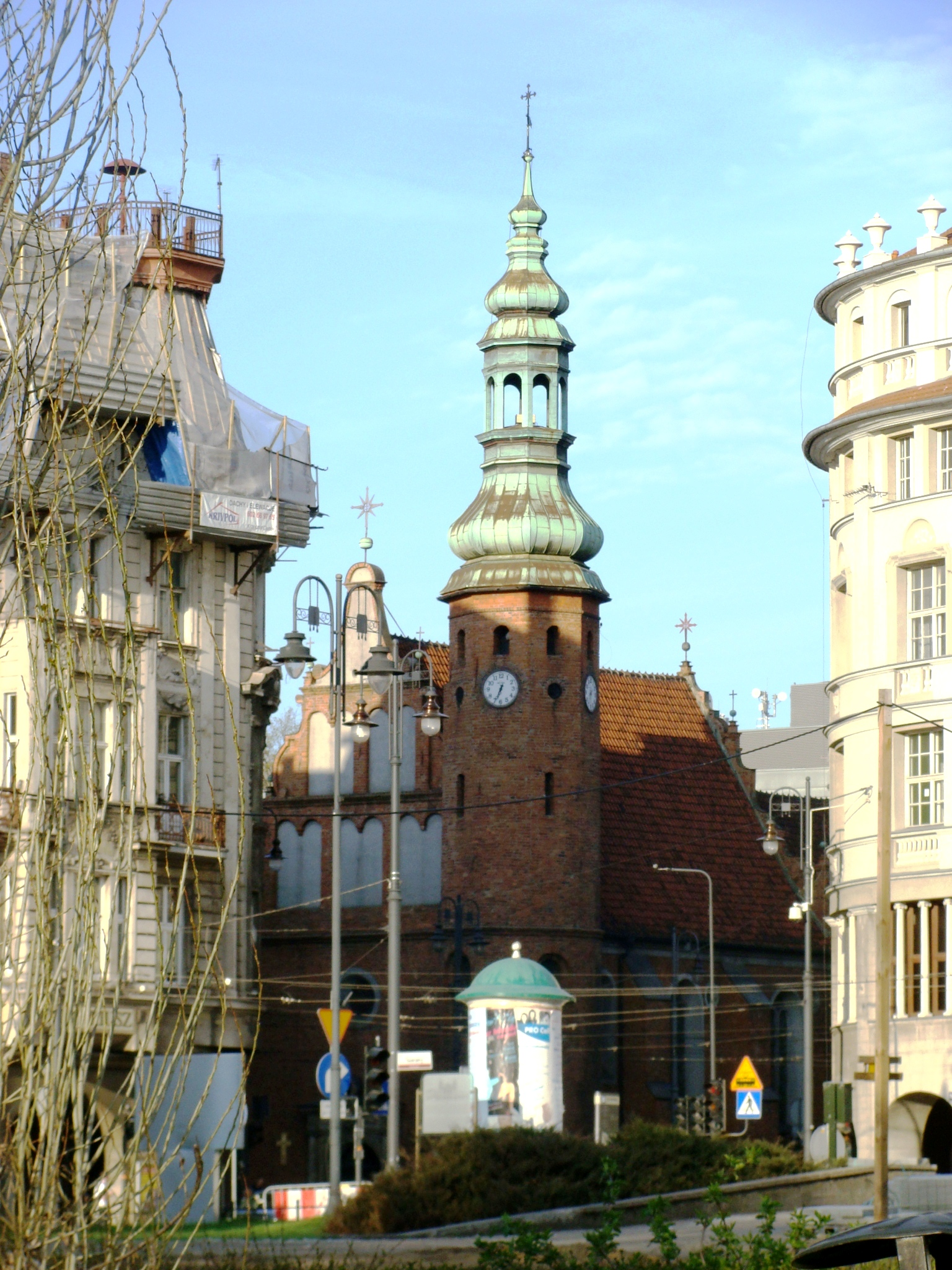 Bydgoszcz, kościół klasztorny klarysek, ob. par. p.w. Matki Boskiej Wniebowziętej, 1582